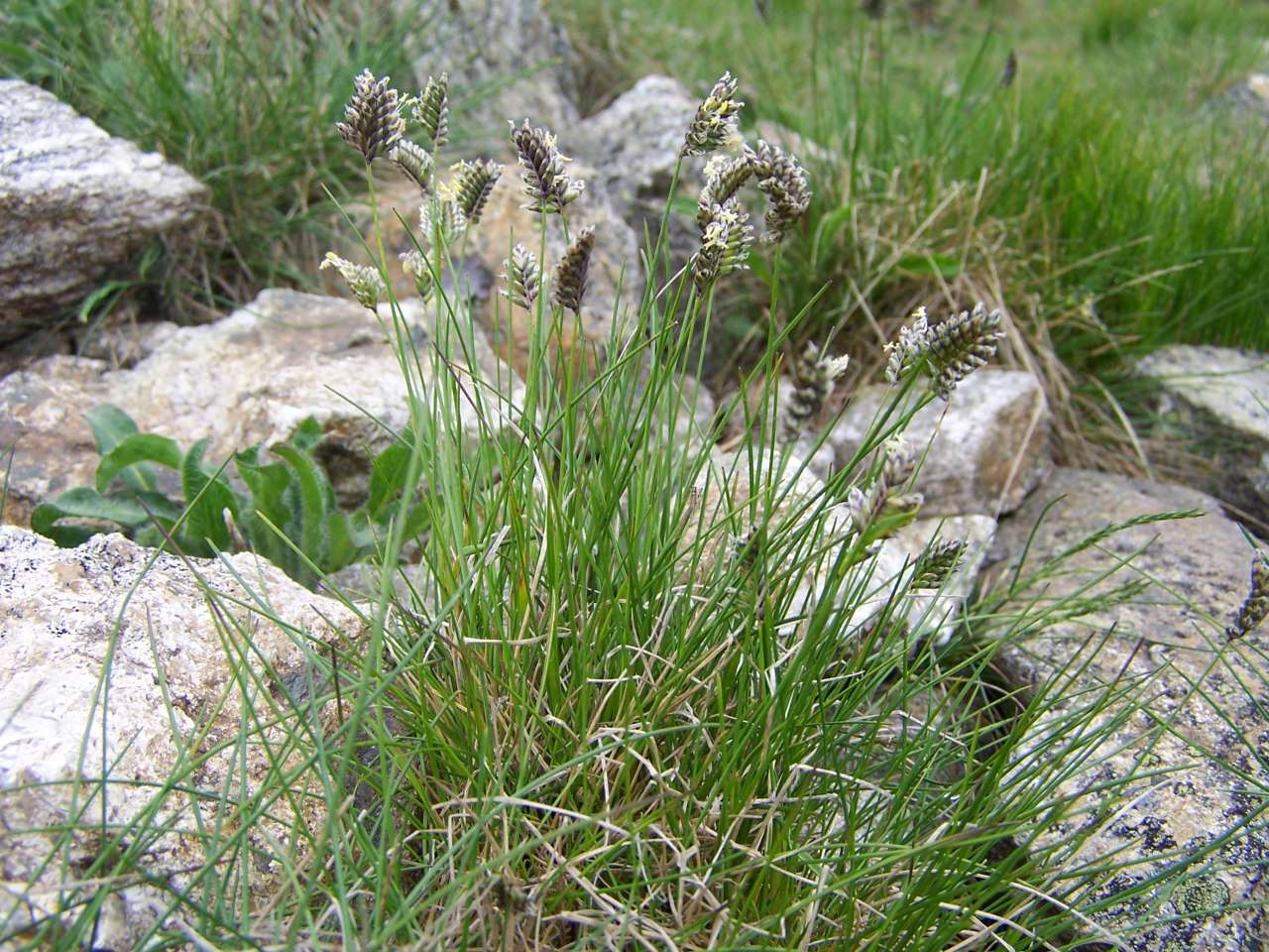 Oreochloa disticha (pl. boimka dwurzędowa), habitat:Tatra Mountains - Czerwone Wierchy